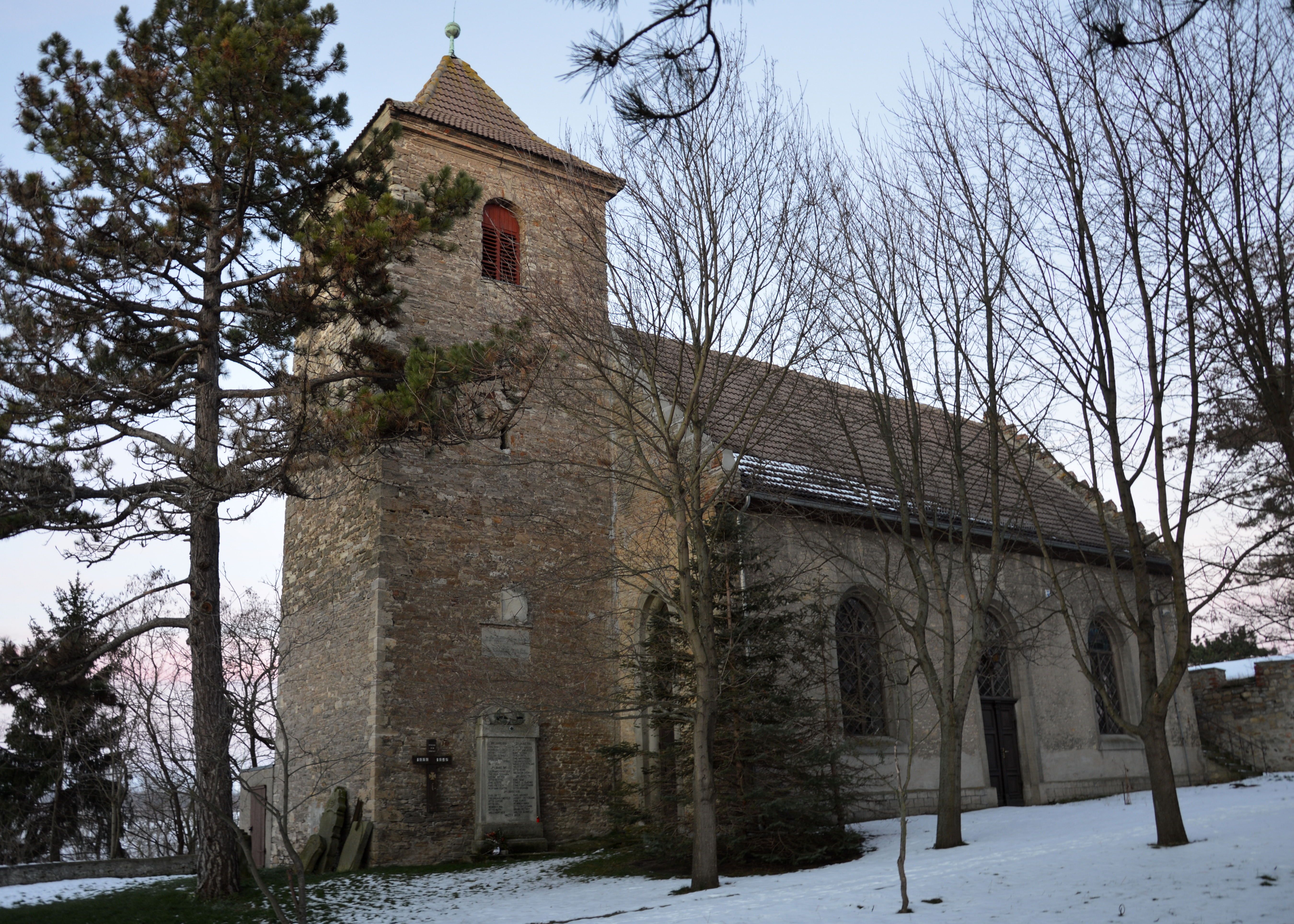 Dorfkirche Hohenerxleben